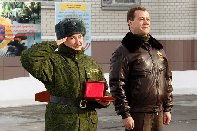 Дмитрий Медведев вручил медаль Суворова начальнику одной из частей 626-го ракетного полка ефрейтору Светлане Епифановой.